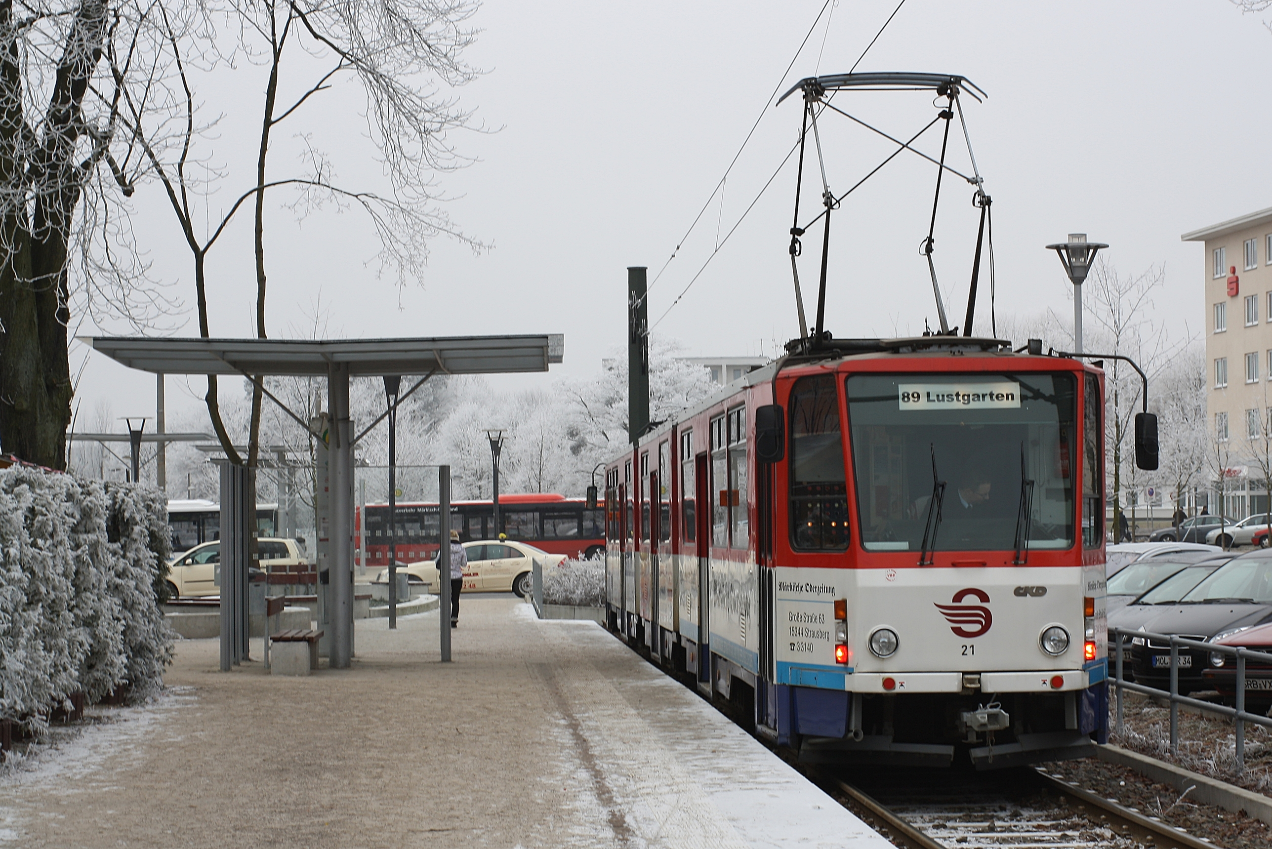 Ein Triebwagen der Strausberger Eisenbahn an der Endstation S-Bahnhof